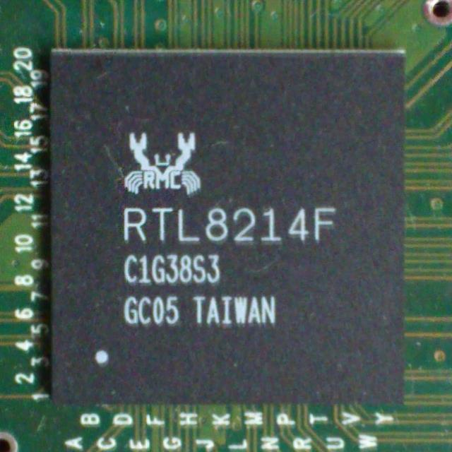 中文（台灣）: 瑞昱半導體的網路晶片RTL8214F